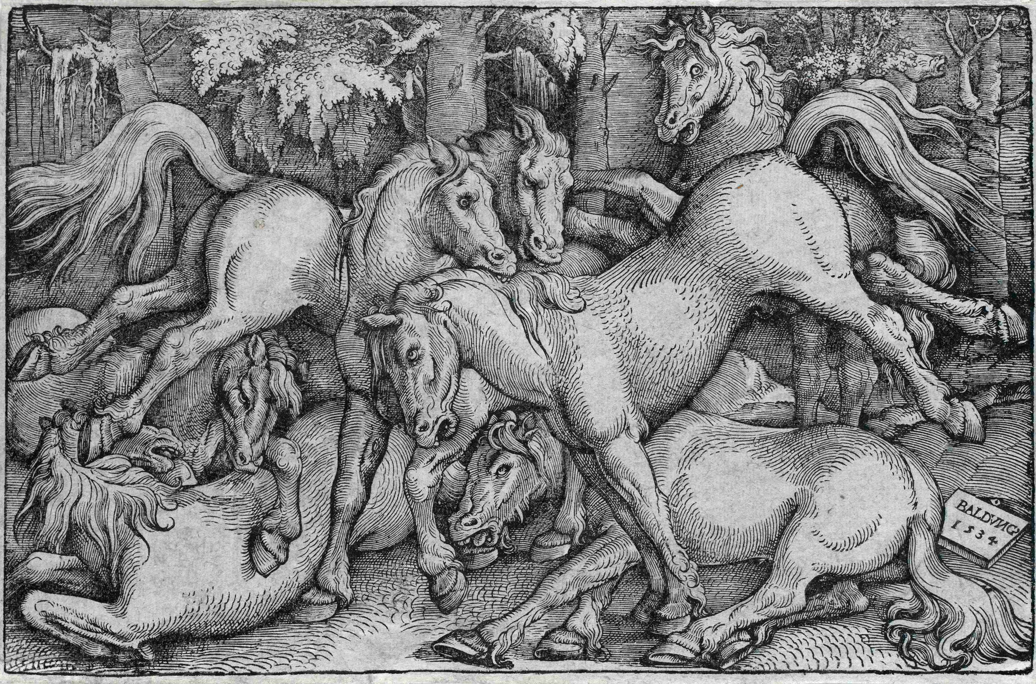 Hans Baldung zv. Grien: Skupina sedmi koní v lese (1534), dřevořez na tónovaném papíře, 215x330 mm, Národní galerie v Praze